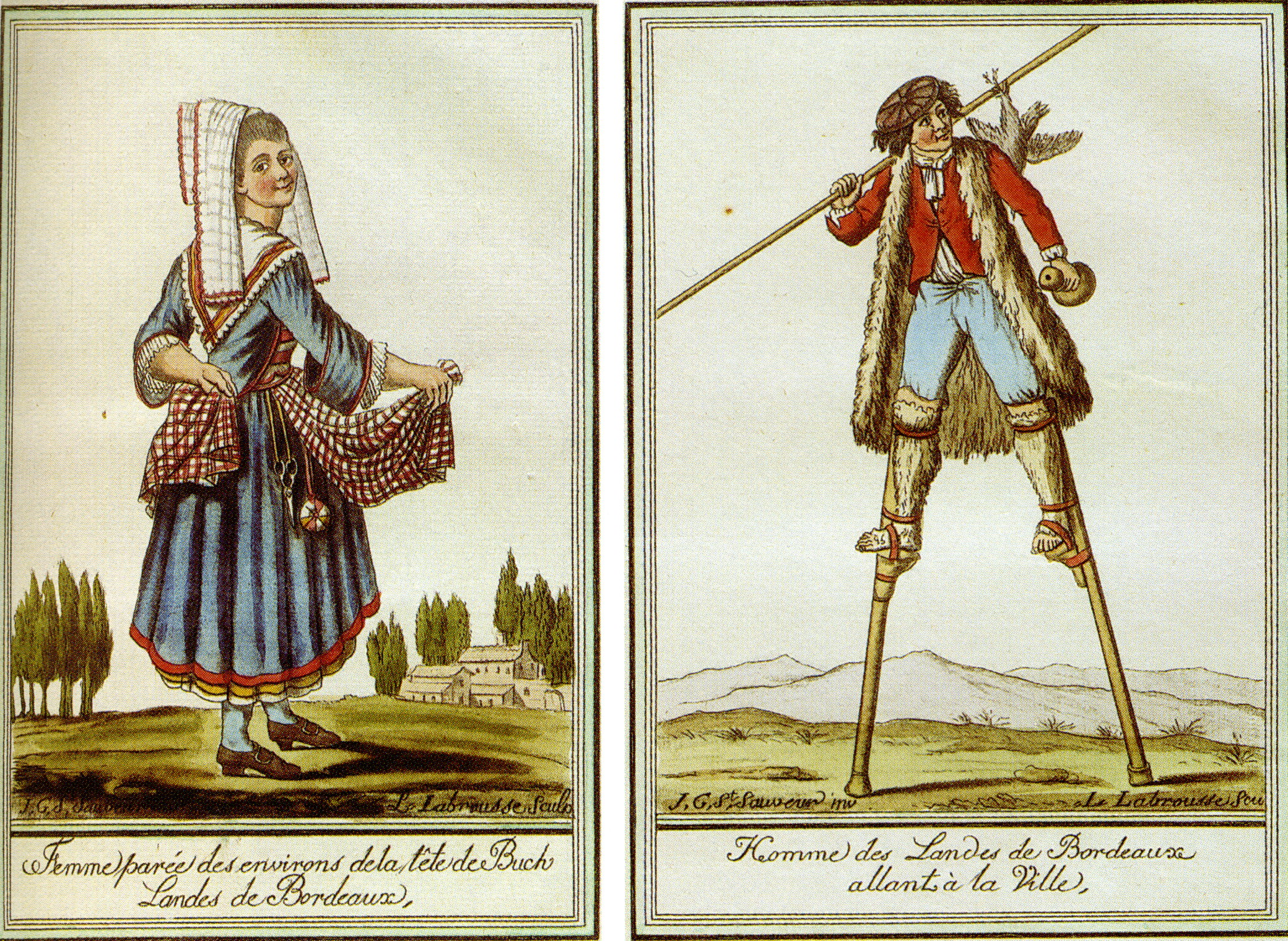 Deux types populaires en Pays de Buch au XVIIIe siècle : une testerine en habit de fête et un berger sur ses tchanques : gravures aquarellées de Labrousse d’après Jacques Grasset Saint Sauveur